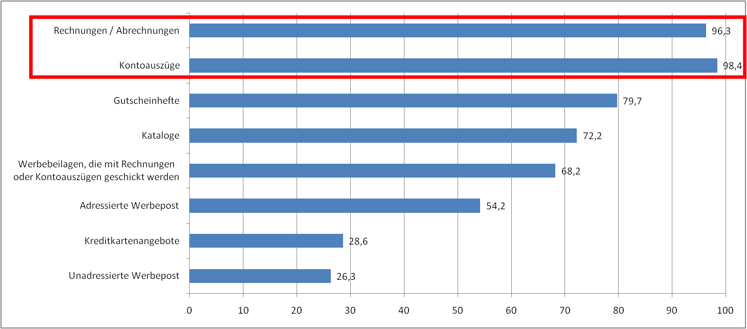 Öffnungsquoten: Vor allem Transaktionsdokumente bekommen die Aufmerksamkeit des Empfängers. werbepost wird meist ungelesen weggeworfen, während Kontoauszüge und Abrechnungen fast immer gelesen werden. (Angaben in Prozent)